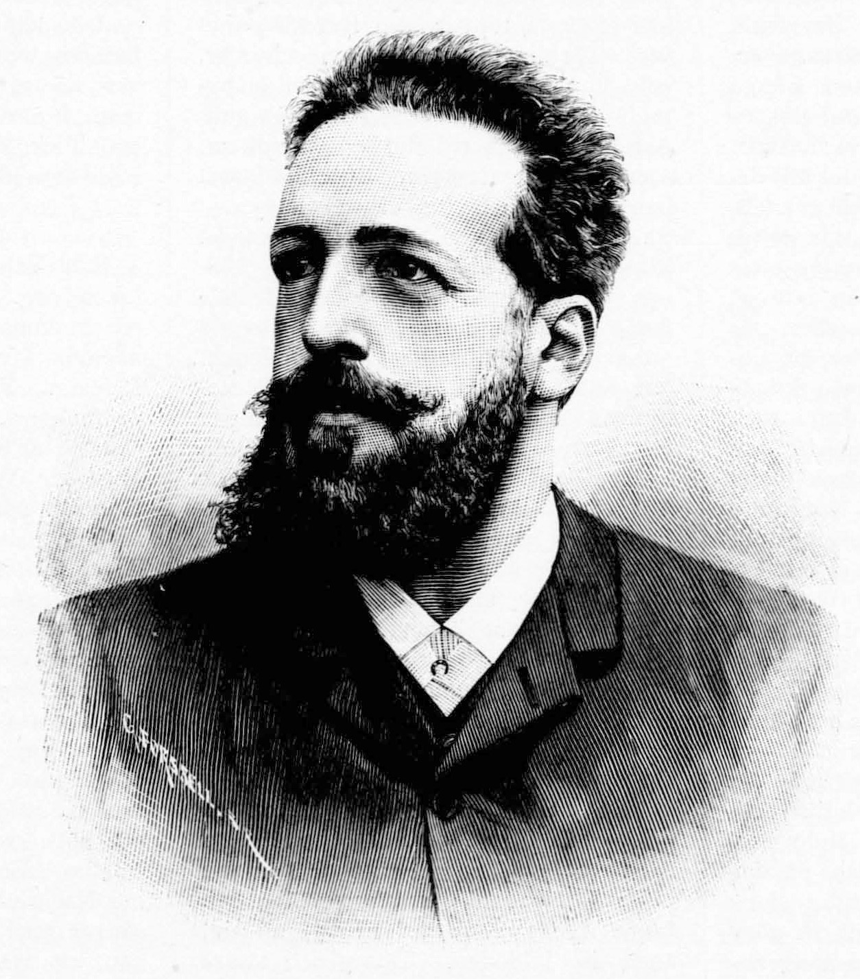 Karl Valentin (1851-1918)